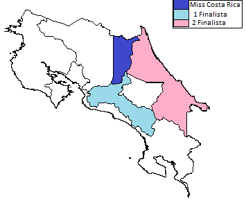 Resultados finales de miss costa rica 2014